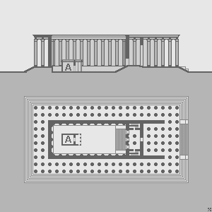 Hypäthraltempel, Apollotempel in Didyma